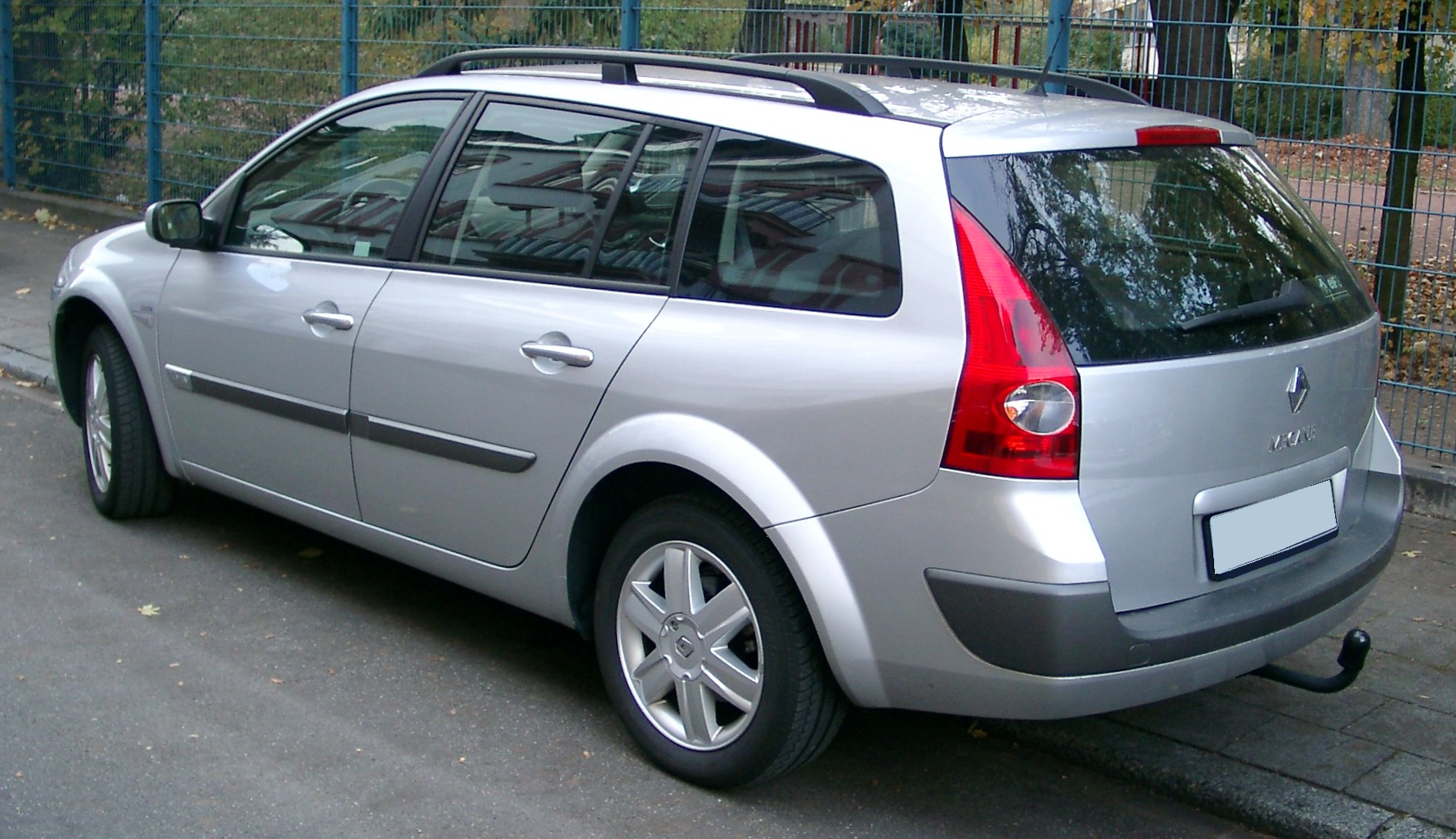 Renault Mégane Kombi